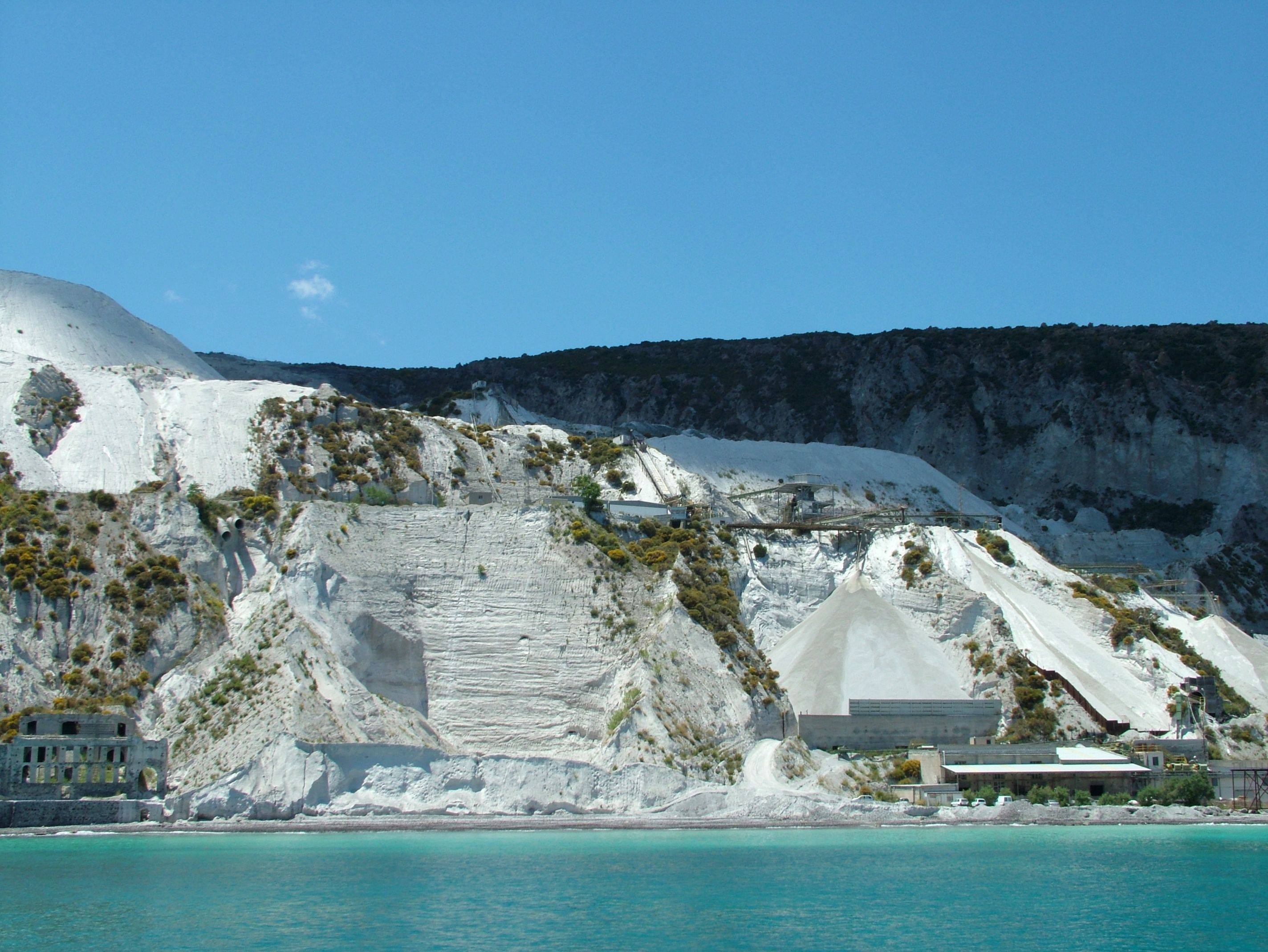 Lipari, Sizilien, die Bimstein Steinbrücke